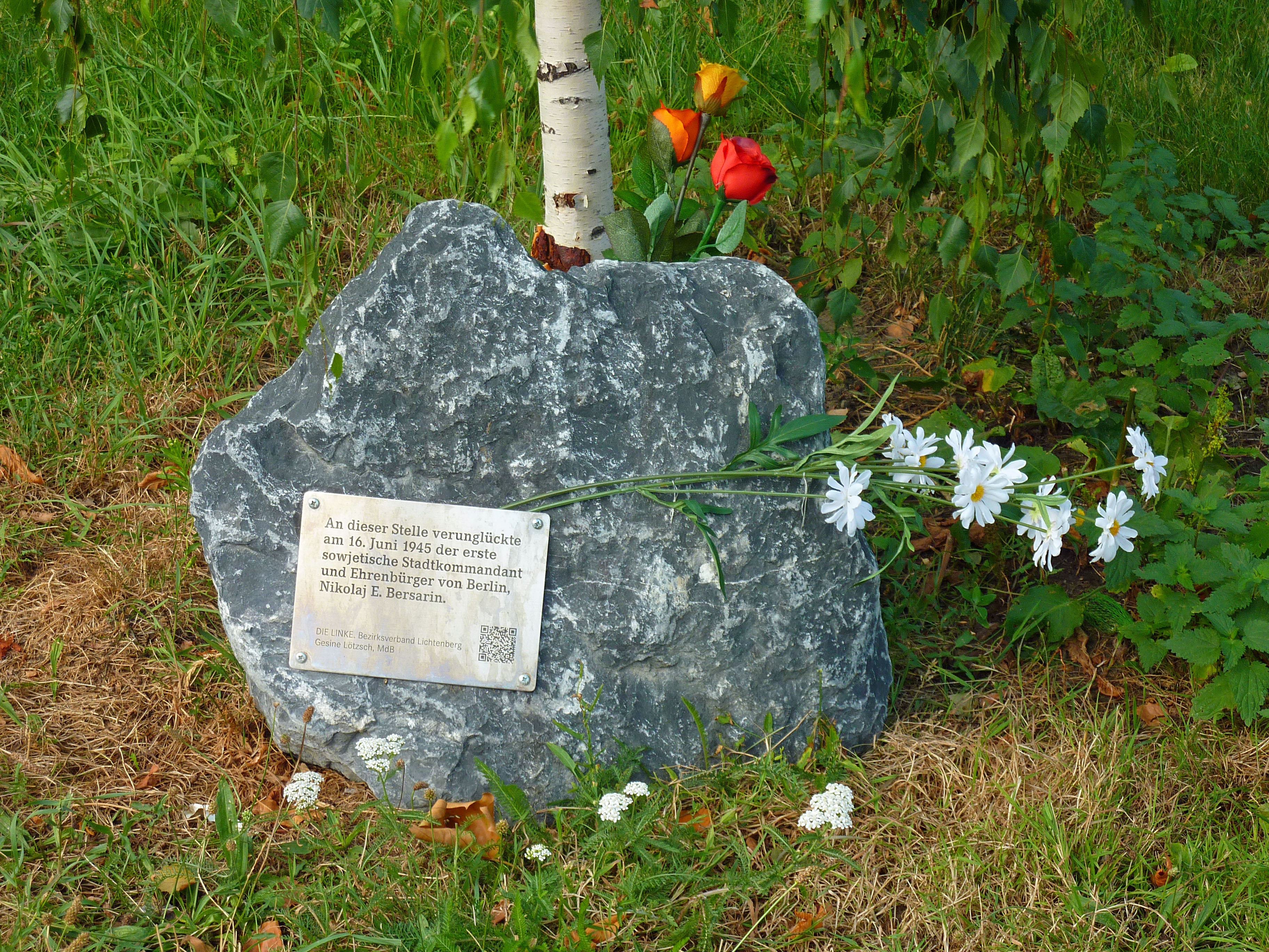 Am 24. Juni 2013 offiziell eingeweihter Gedenkstein für Nikolaj E. Bersarin in Berlin-Friedrichsfelde, am vermeintlichen Unfallort der heutigen Kreuzung Am Tierpark/Alfred-Kowalke-Straße. [1]